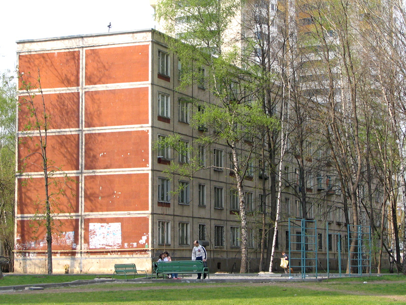 Дом серии К-7 в Кузьминках на ул. Марш. Чукова / K-7 apartment block in Moscow